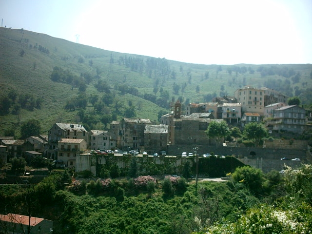 Photo Lucciana by LAT.(2005)